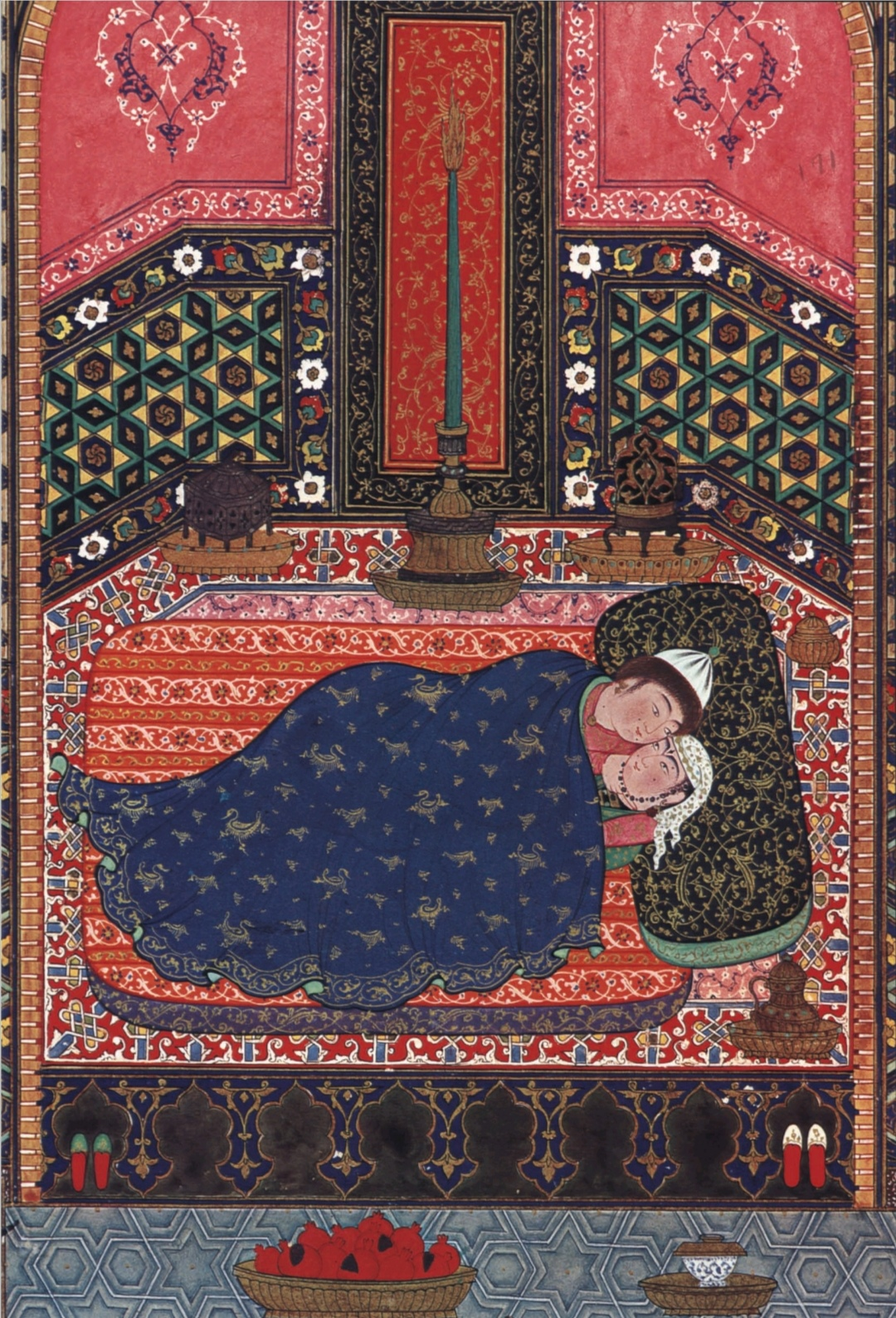 تصویر اردشیر و گلنار، دخترک کنیز د شاهنامه بایسنقری که توسط موزه متروپولیتن منتشر شده